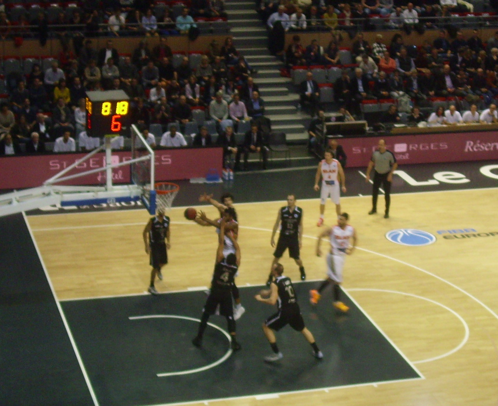 Match de FIBA Europe Cup 2015-2016 entre l'Elan Chalon et Den Bosch